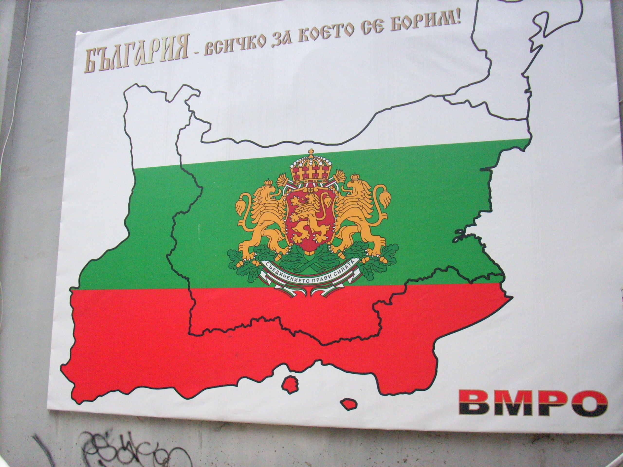 Mur peint près du siège de la VMRO bulgare à Varna